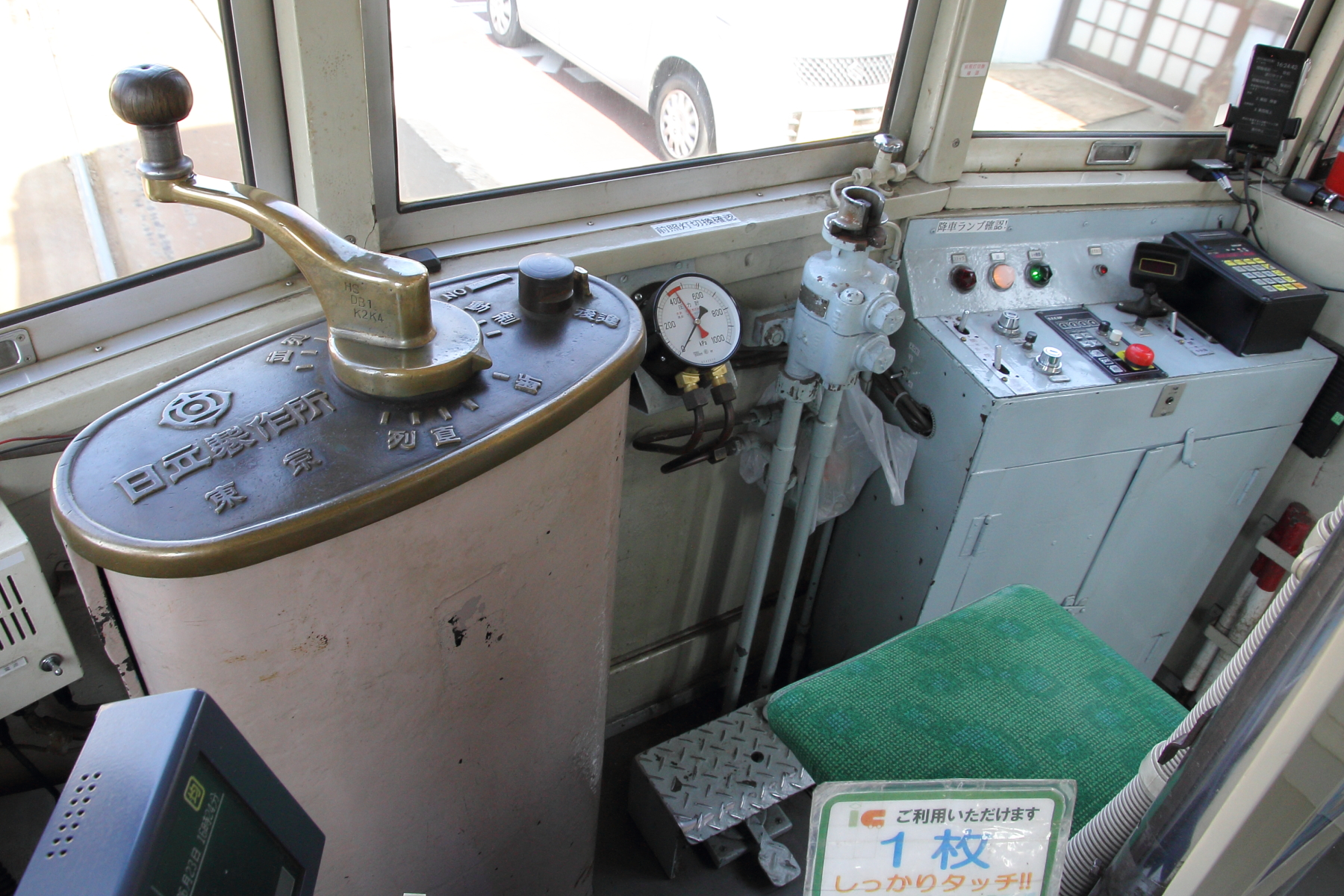 豊橋鉄道モ3200形3202の運転台